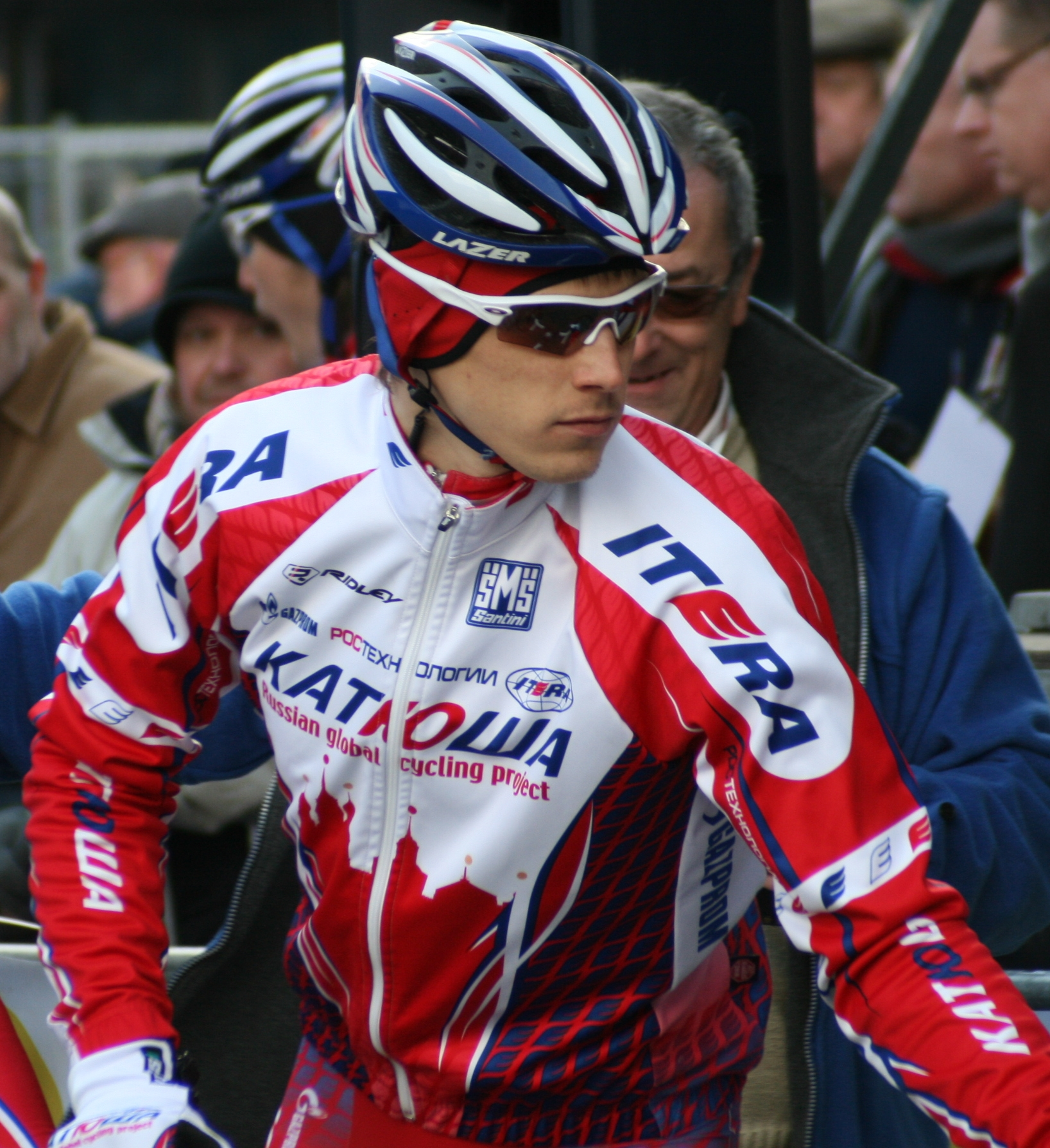 Alexander Porsev lors des Trois jours de Flandre occidentale 2010